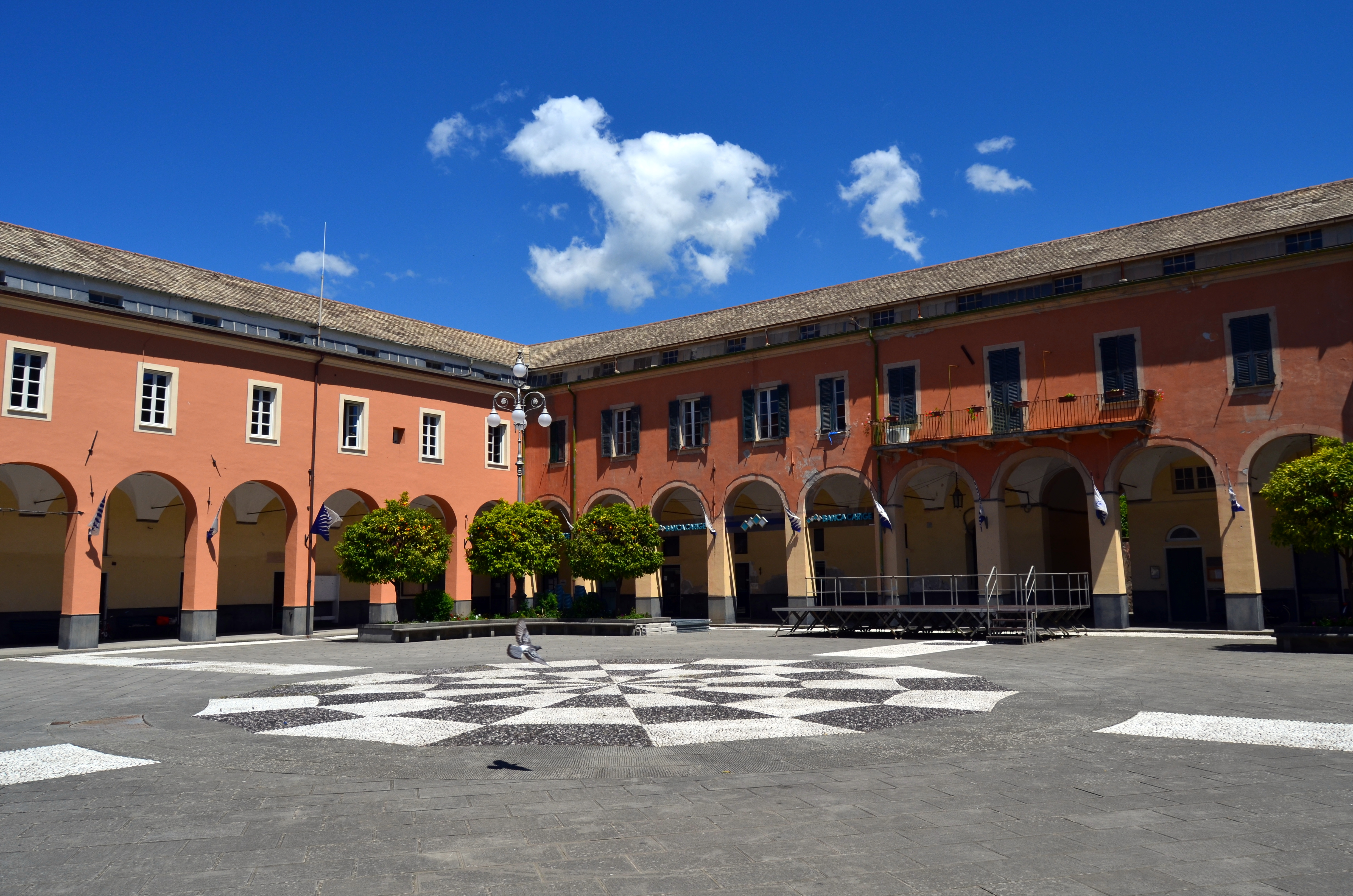 Ex complesso monastico delle Clarisse, oggi sede della biblioteca e del municipio di Levanto, Liguria, Italia